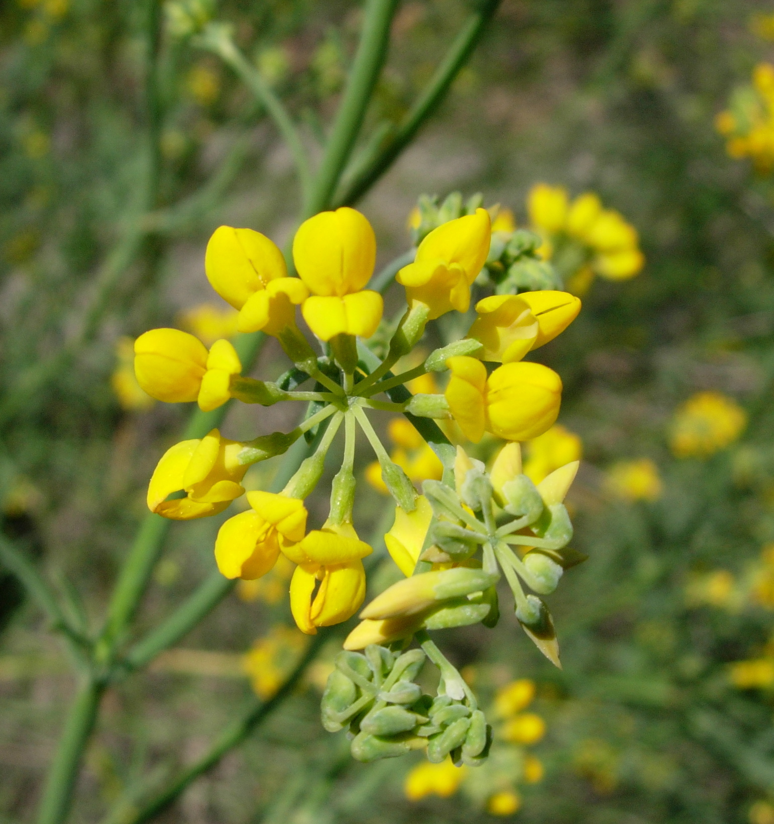 Foto de Coronilla juncea